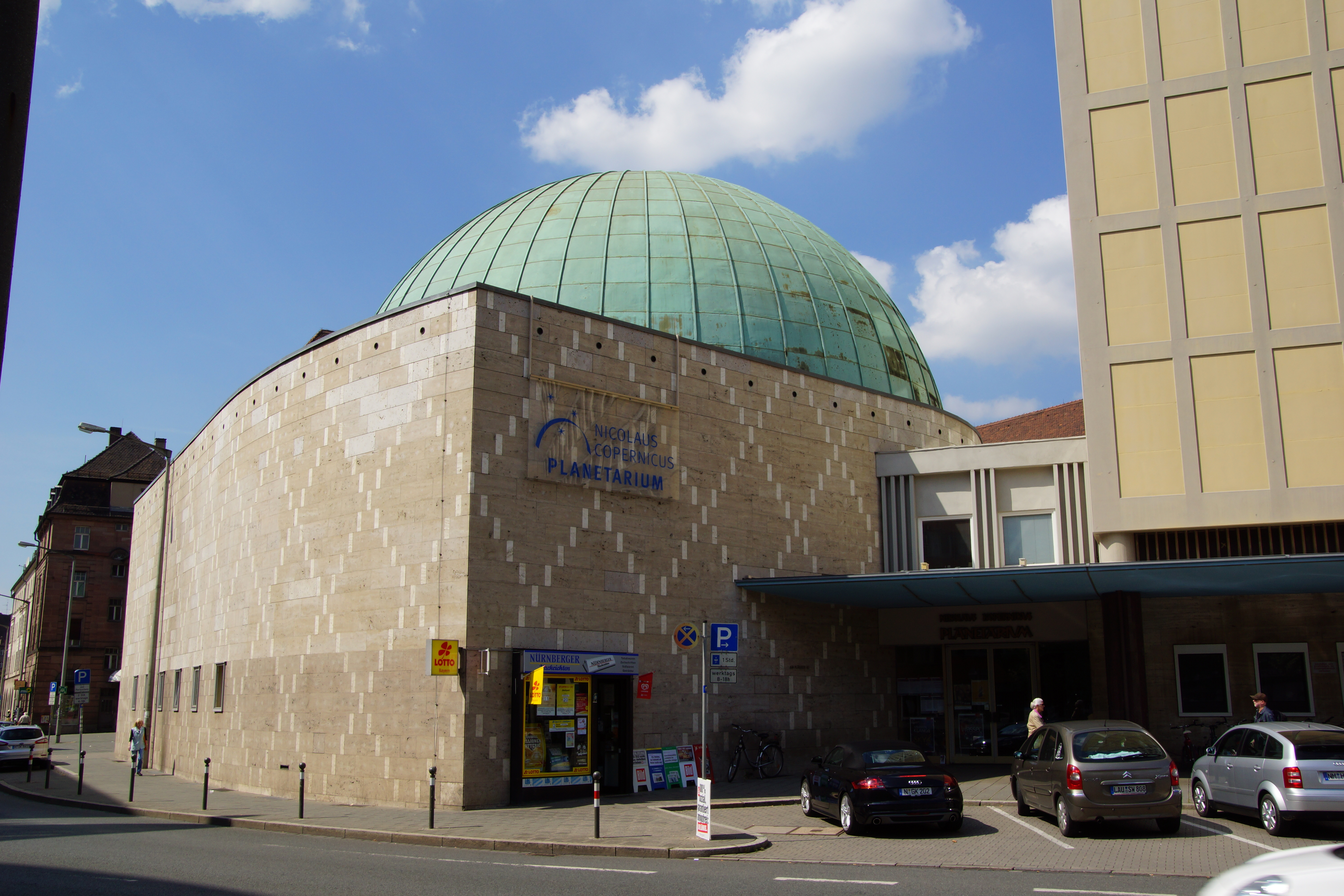 Das Nikolaus-Kopernikus-Planetarium in Nürnberg